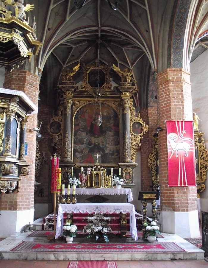 Tuczno, ul. Moniuszki - rzymskokatolicki kościół parafialny p.w. Wniebowzięcia NMP, 1 poł. XV, 1646, XVIII/XIX